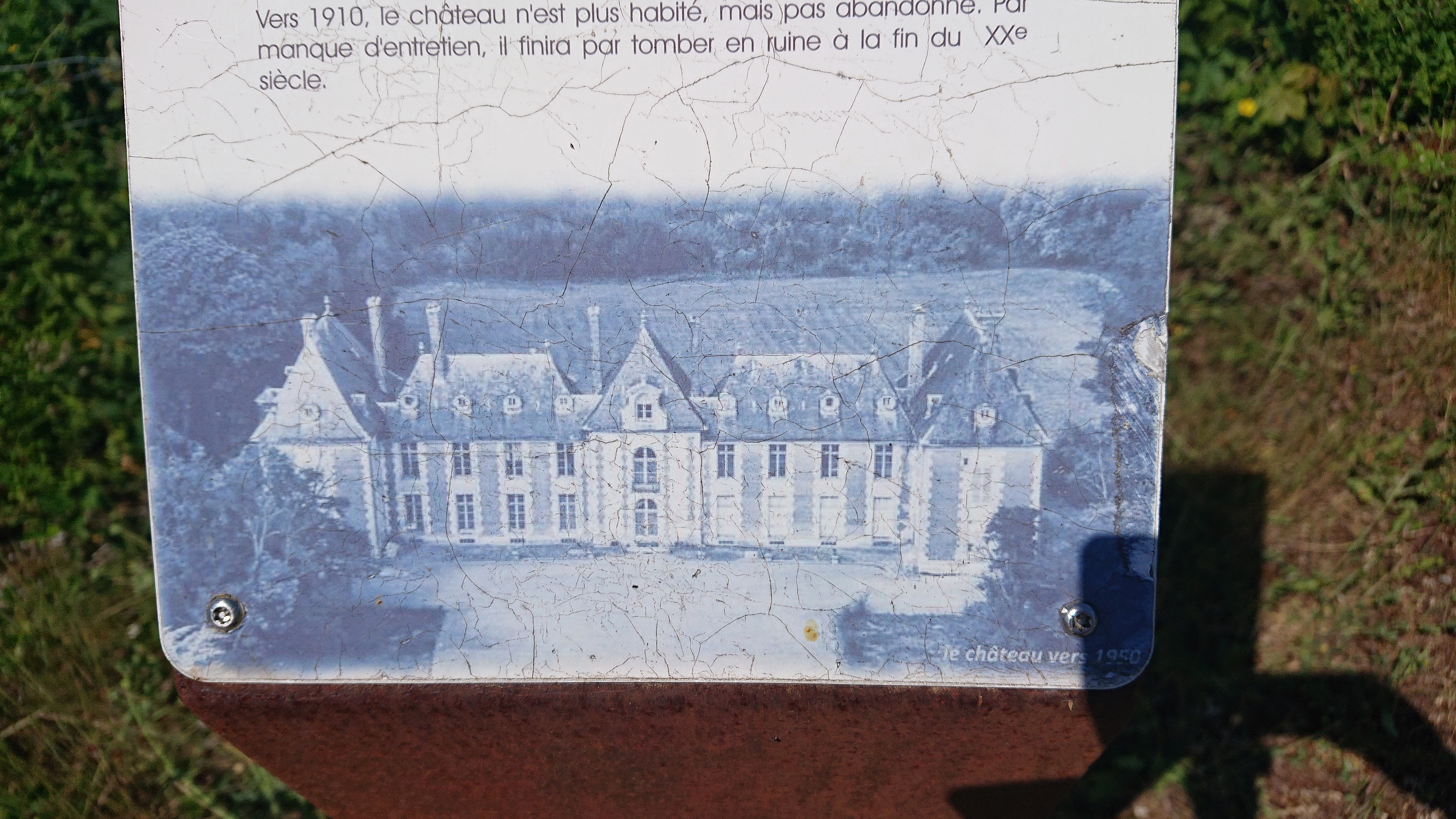 Vieux château Coupvray